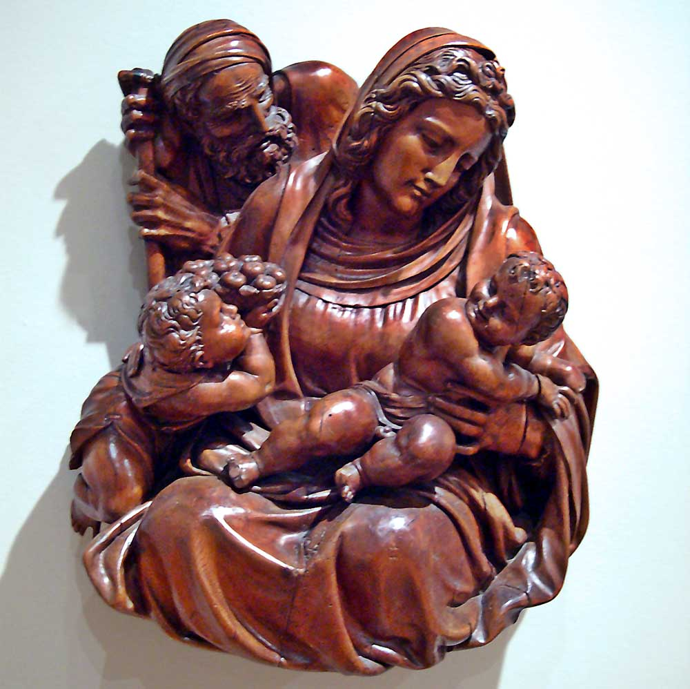 GABRIEL YOLY, anteriormente atribuida a Diego Siloé